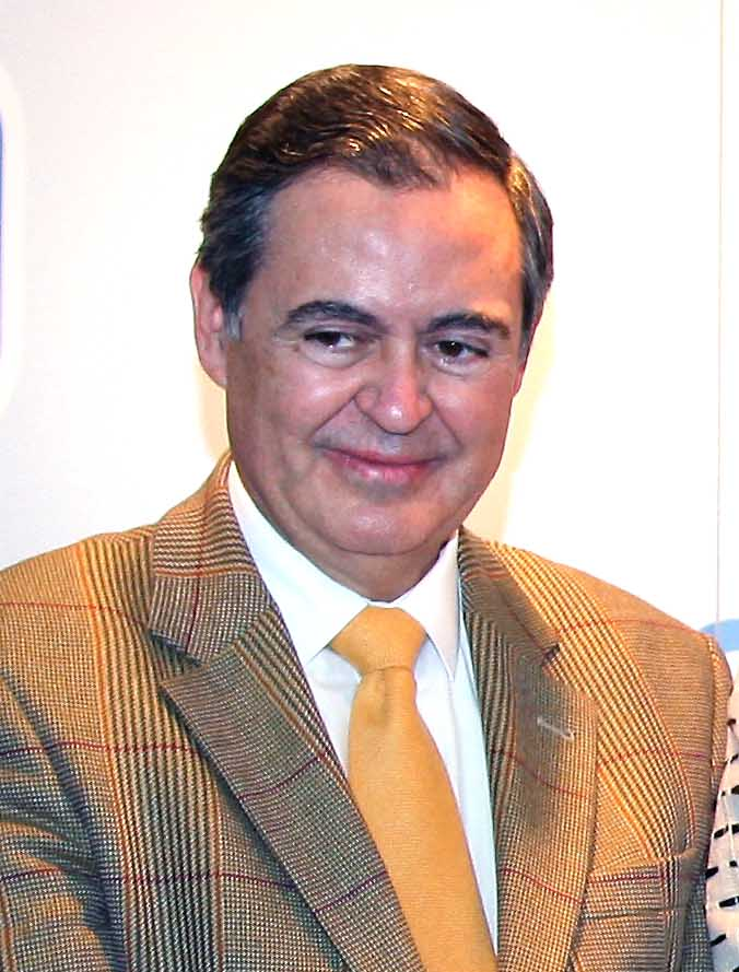 Jornadas Económicas Abiertas del PP de Moncloa-Aravaca